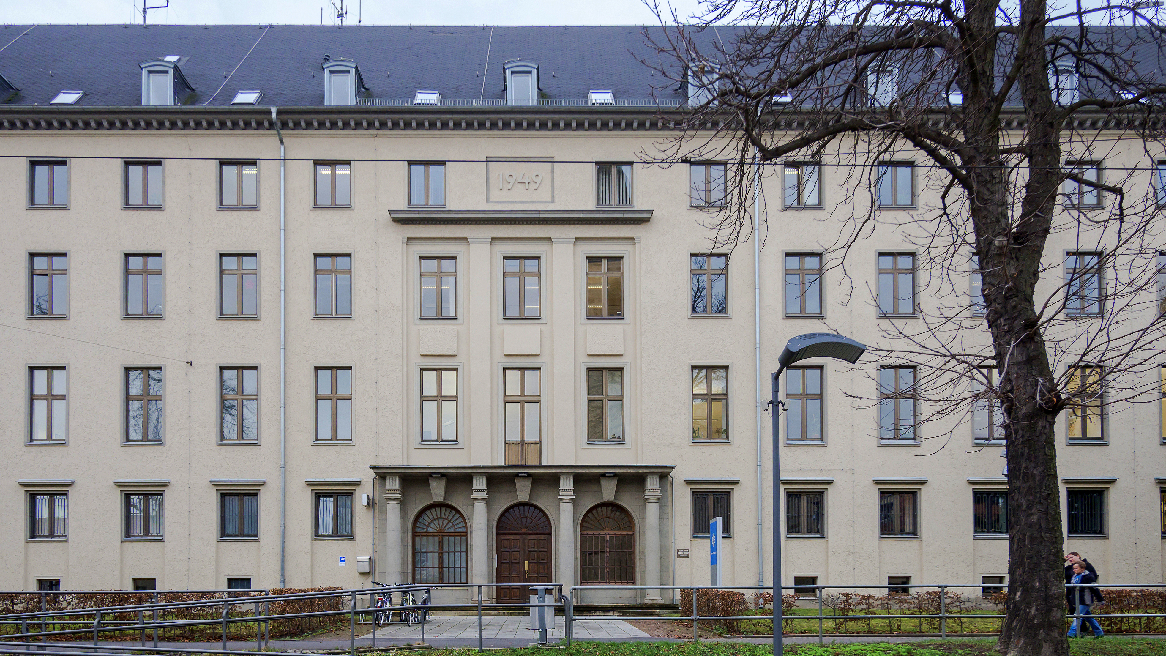 Erfurt Andreasstrasse 38 Verwaltungsgebäude 2